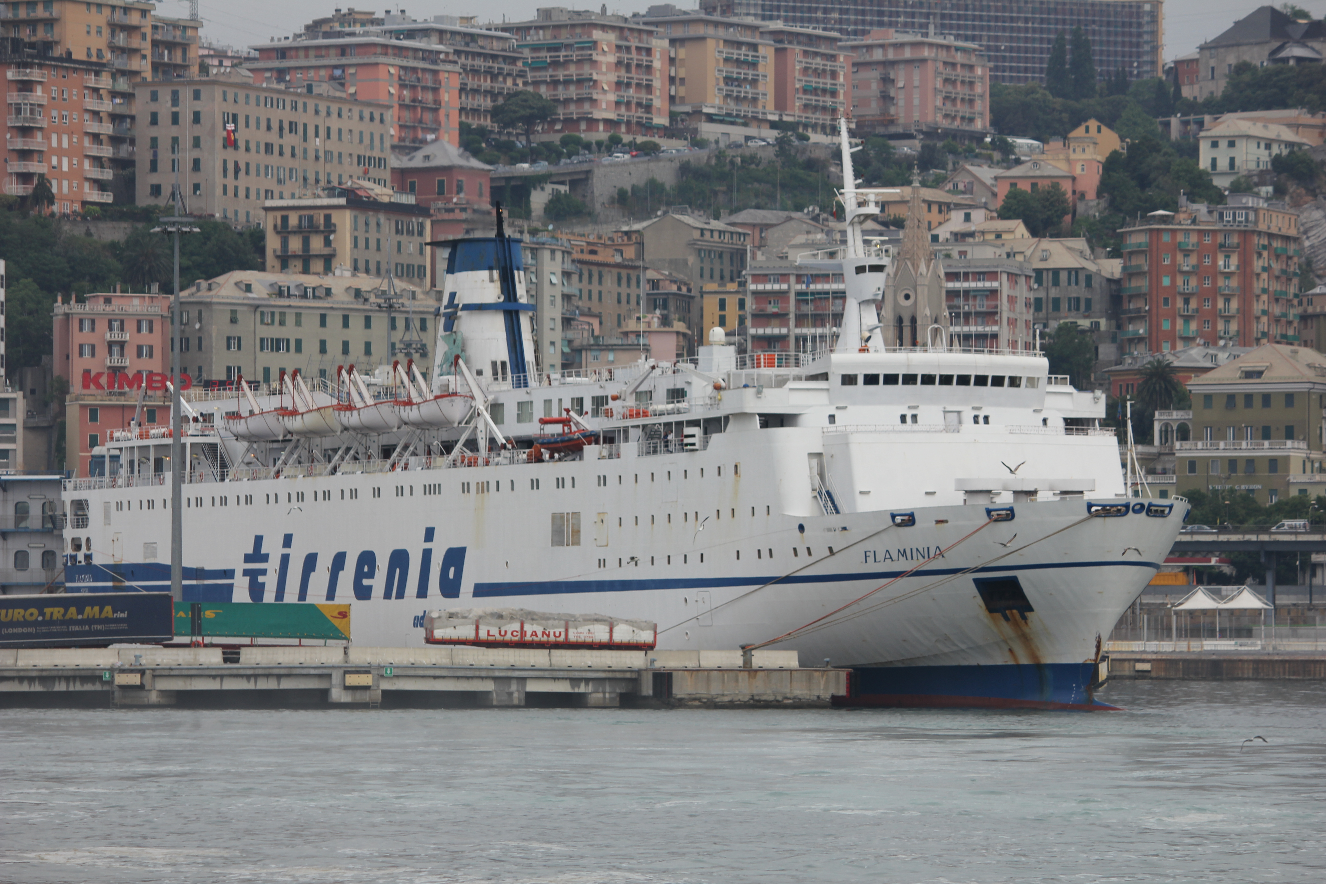 Tirrenia's ferry Flaminia berthed in Genoa's harbour